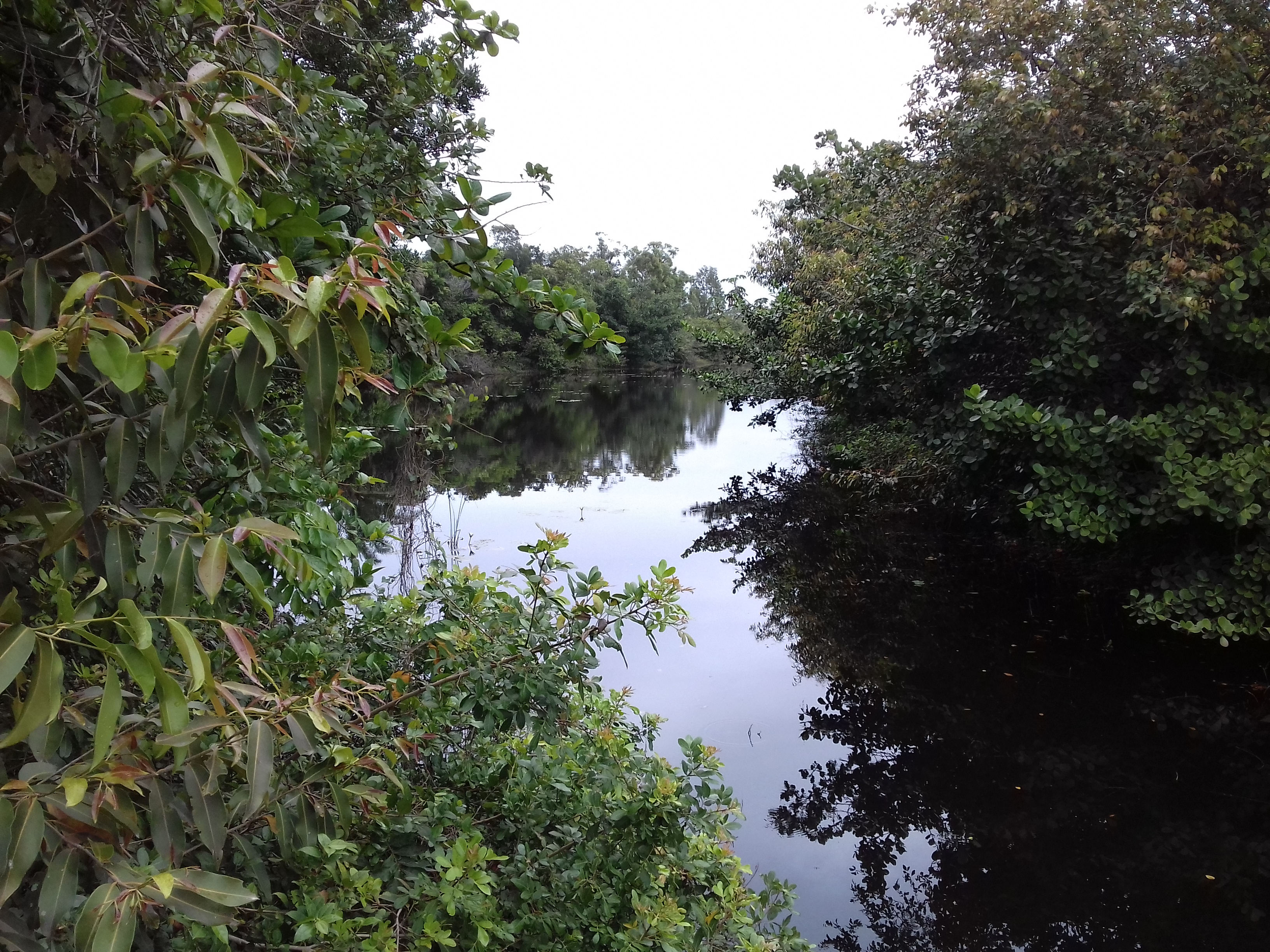 Bosque da Barra Lebensraum für Aligatoren und Capybara, Rio de Janeiro, RJ, Brasil